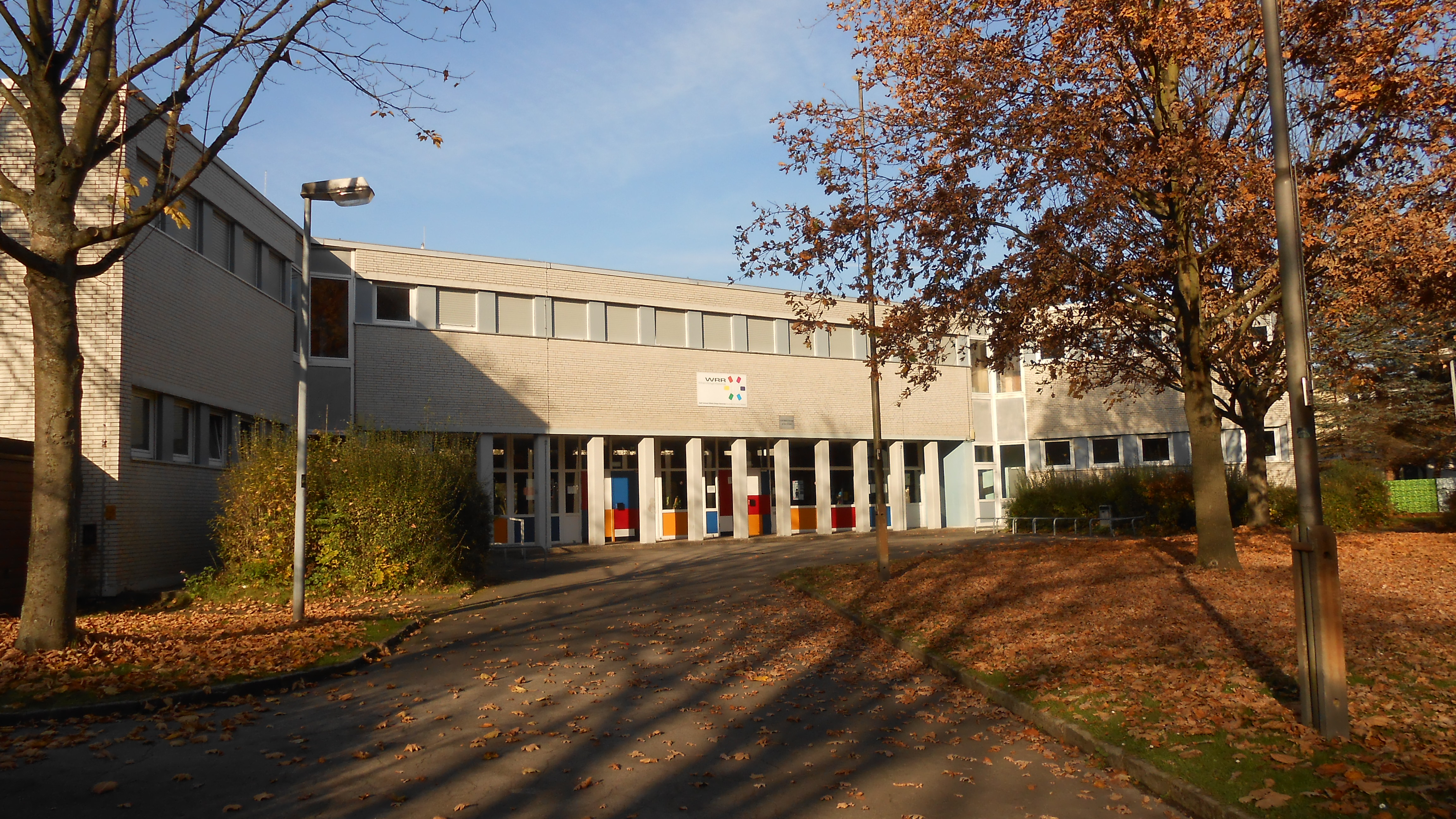 Frontansicht der Wilhelm-Röntgen-Realschule in Dortmund